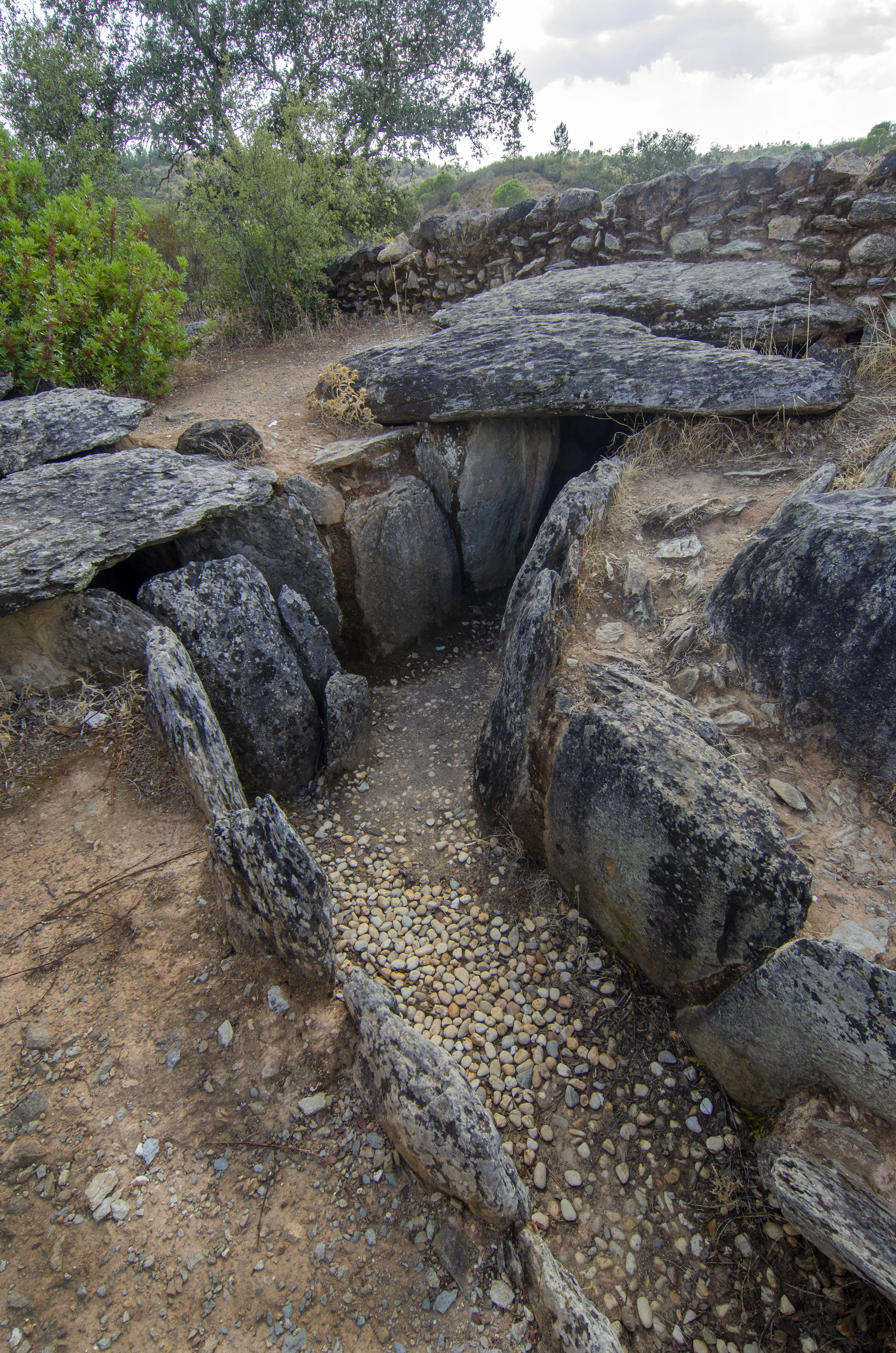 El Pozuelo, Zalamea la Real, Huelva.